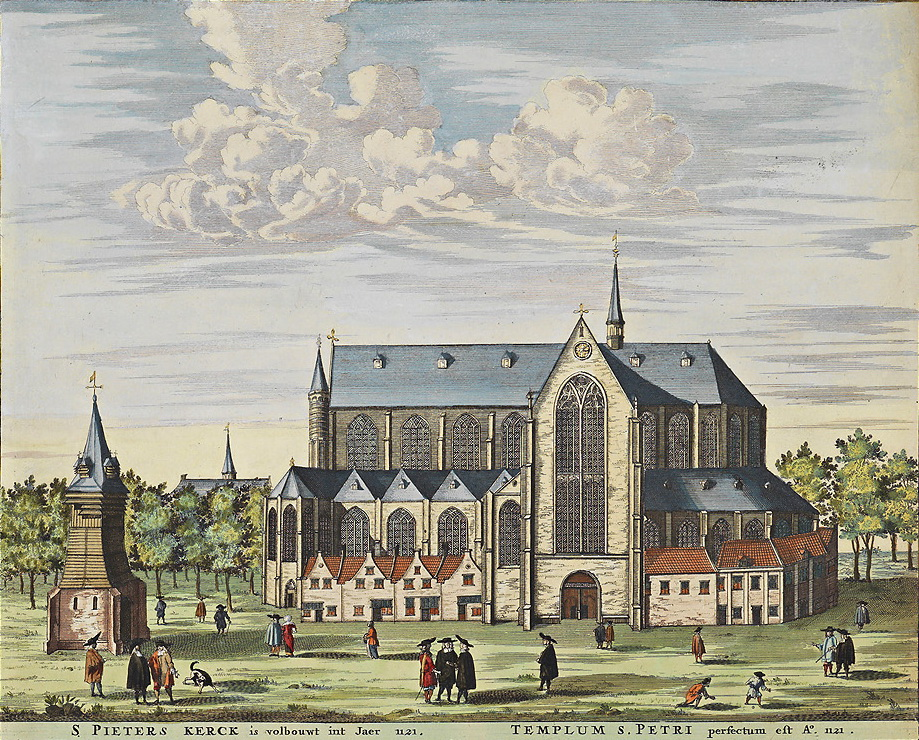 Pieterskerk van Leiden uit het Stedenboek van Frederick de Wit.